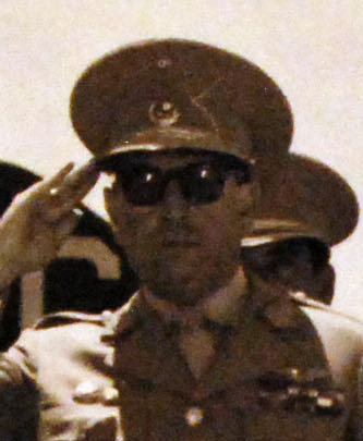 Manuel A. Odría, presidente del Perú.